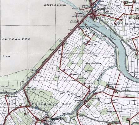 Nieuwe_Ruigezandsterpolder